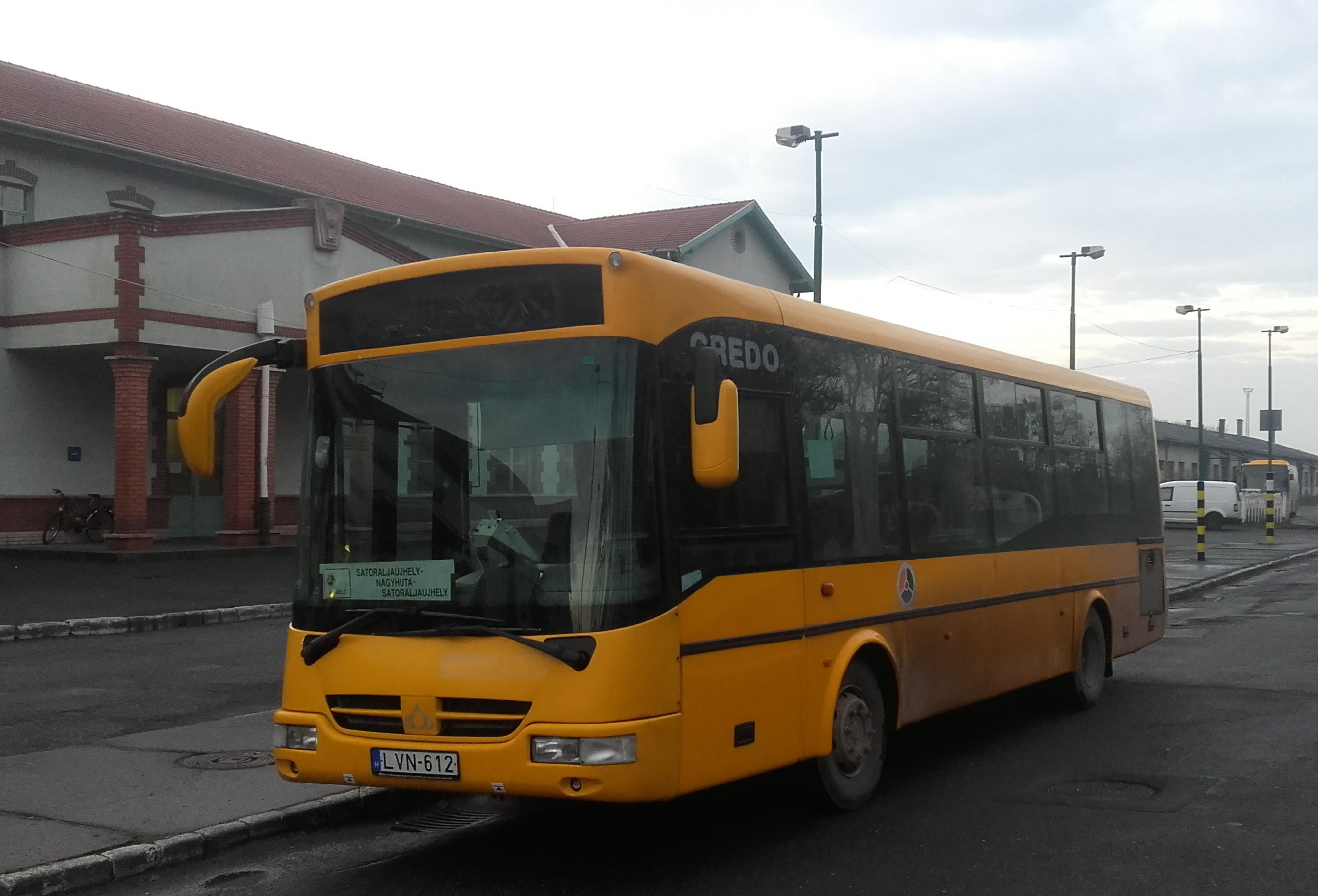 Az ÉMKK LVN-612 rendszámú Credo EN 9,5 típusú busza Sátoraljaújhelyen, a 3901-es helyközi járaton.